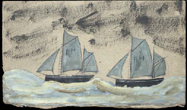 Alfred Wallis Two sailboats with 'BH' on the sails pencil and oil on card 9 x 15 in. (22.9 x 38.1 cm.) Aus der Sammlung Dallas Doxford versteigert bei Christie's 2007.